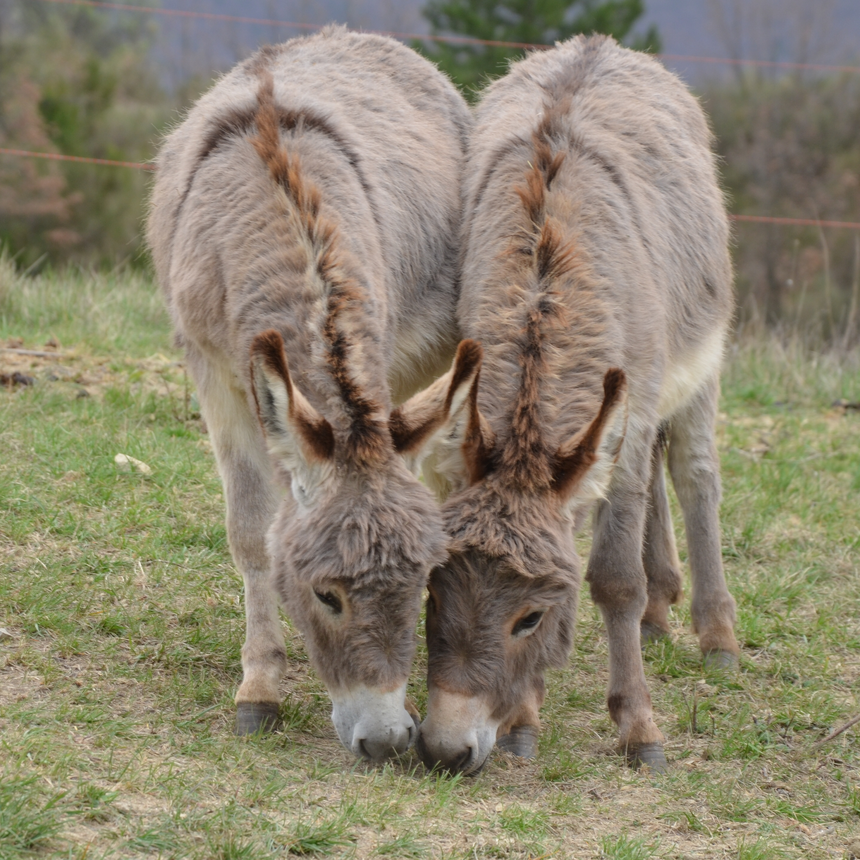 Ânes de Provence à Entrepierres